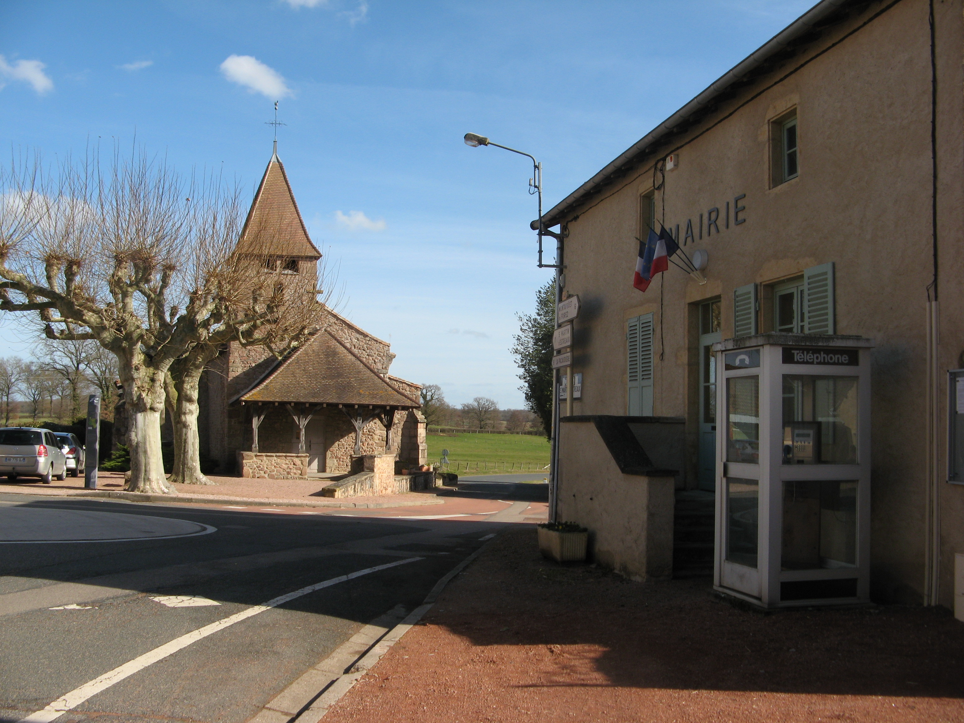 Sail-les-Bains, la mairie et l'église